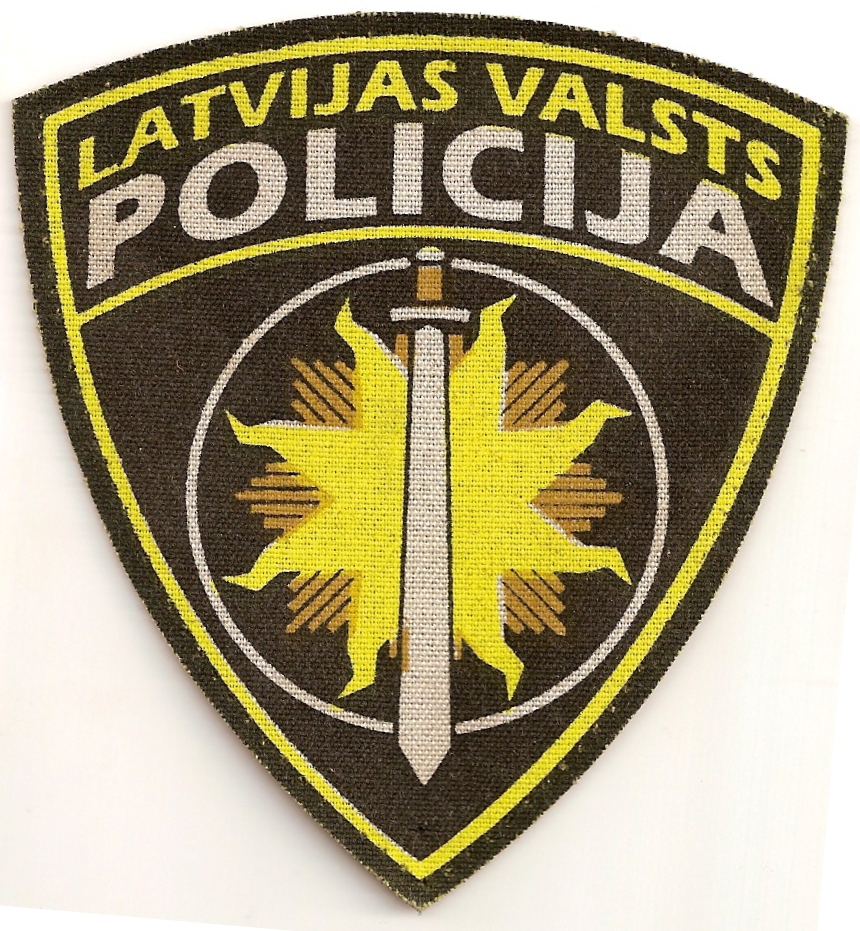 Latvia policepatch